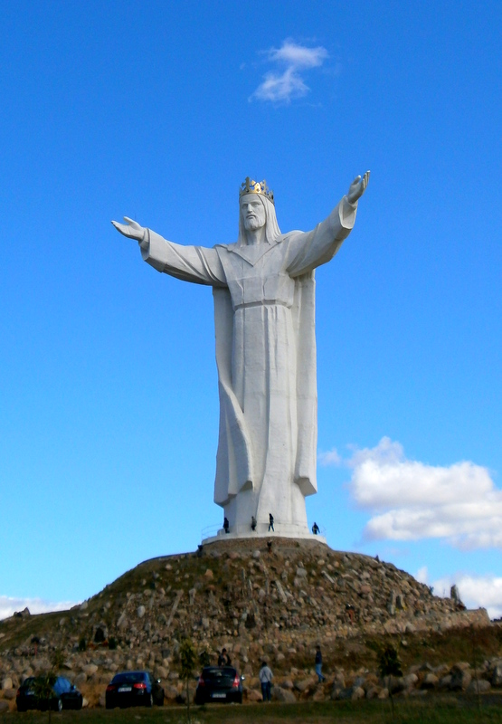 Świebodzin, Pomnik Chrystusa Króla